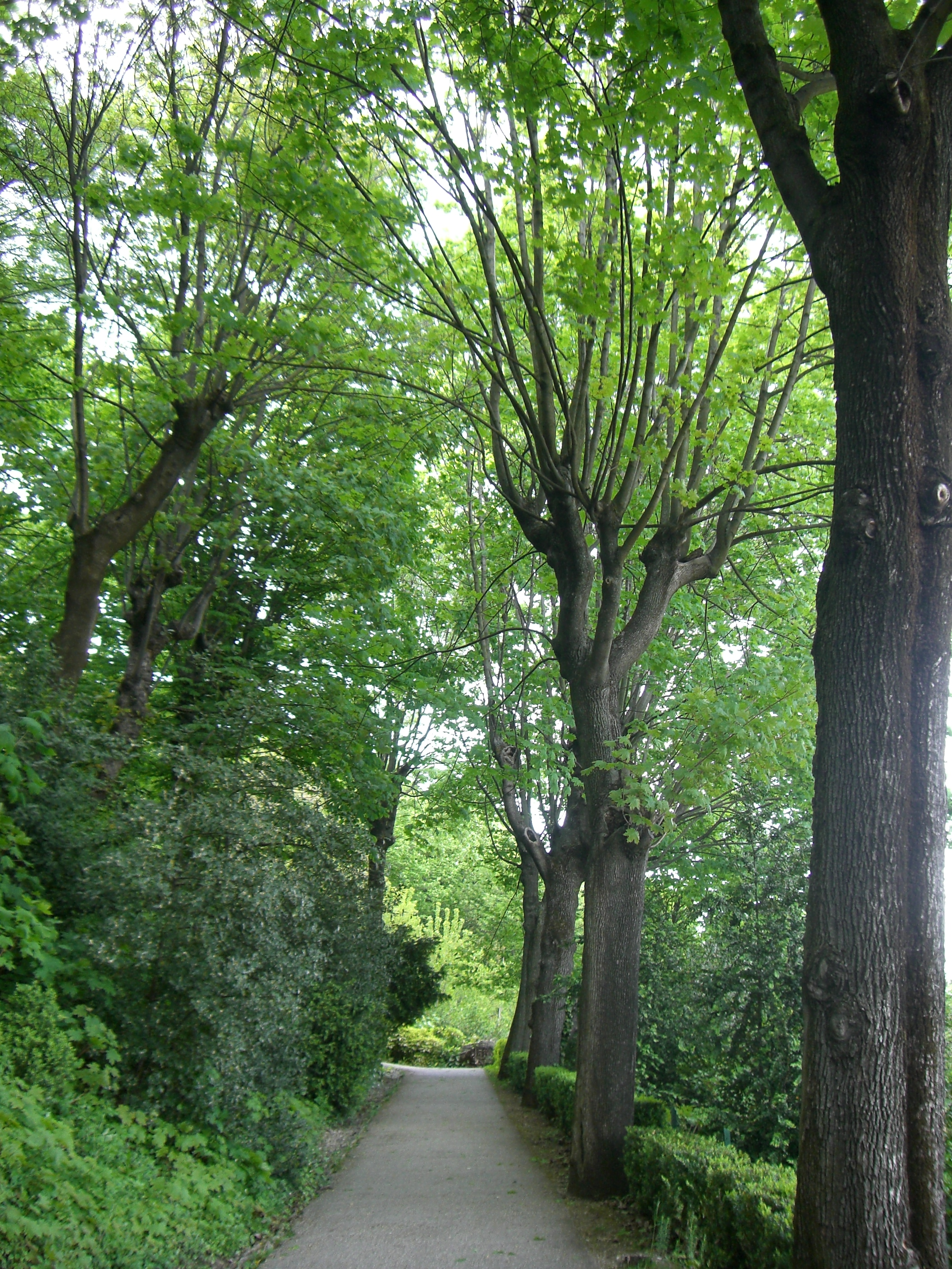 Lyon - Parc des Hauteurs